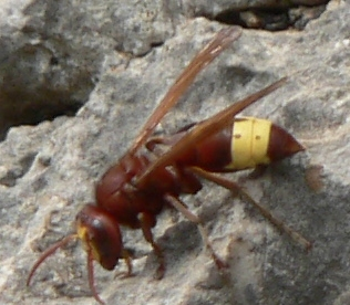 Vespa orientalis, Lato archaeological site (Agios Nikolaos, Crete, Greece)